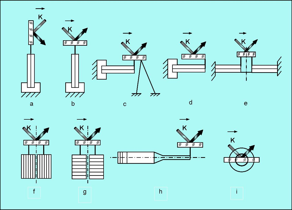 П’єзоелектричний (ПЕ) оптичний дефлектор (англ. Piezoelectric optical scanner) – пристрій, в якому відхилення оптичного пучка у просторі досягається за допомогою зворотного п’єзоелектричного ефекту, що проявляється в деформації внесеного в електричне поле кристалу при певній орієнтації силових ліній поля та електричної вісі кристалу і використанні цієї деформації для механічного повертання дзеркального відбивача.